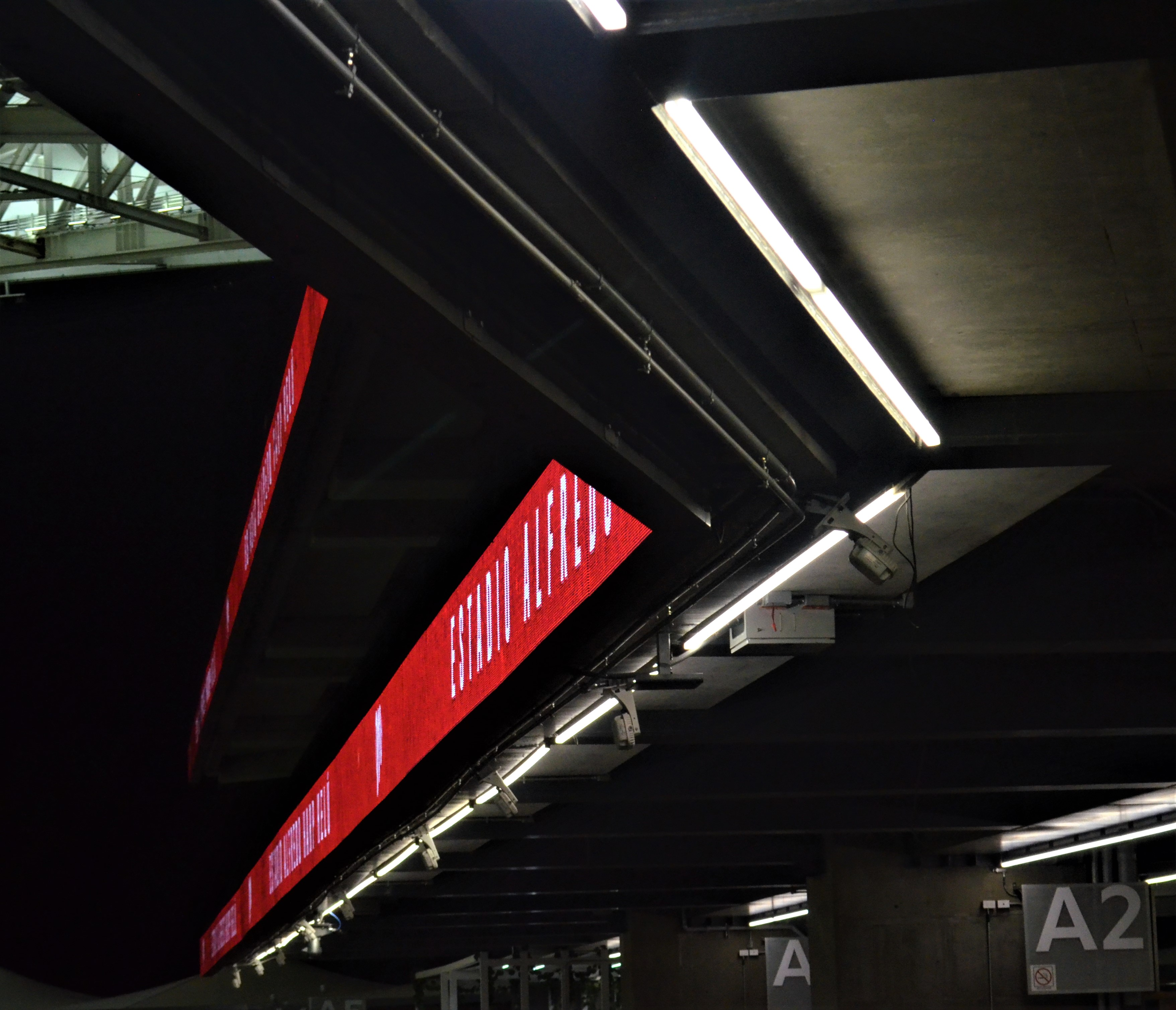 Pantallas Banner en el Estadio Alfredo Harp Helú